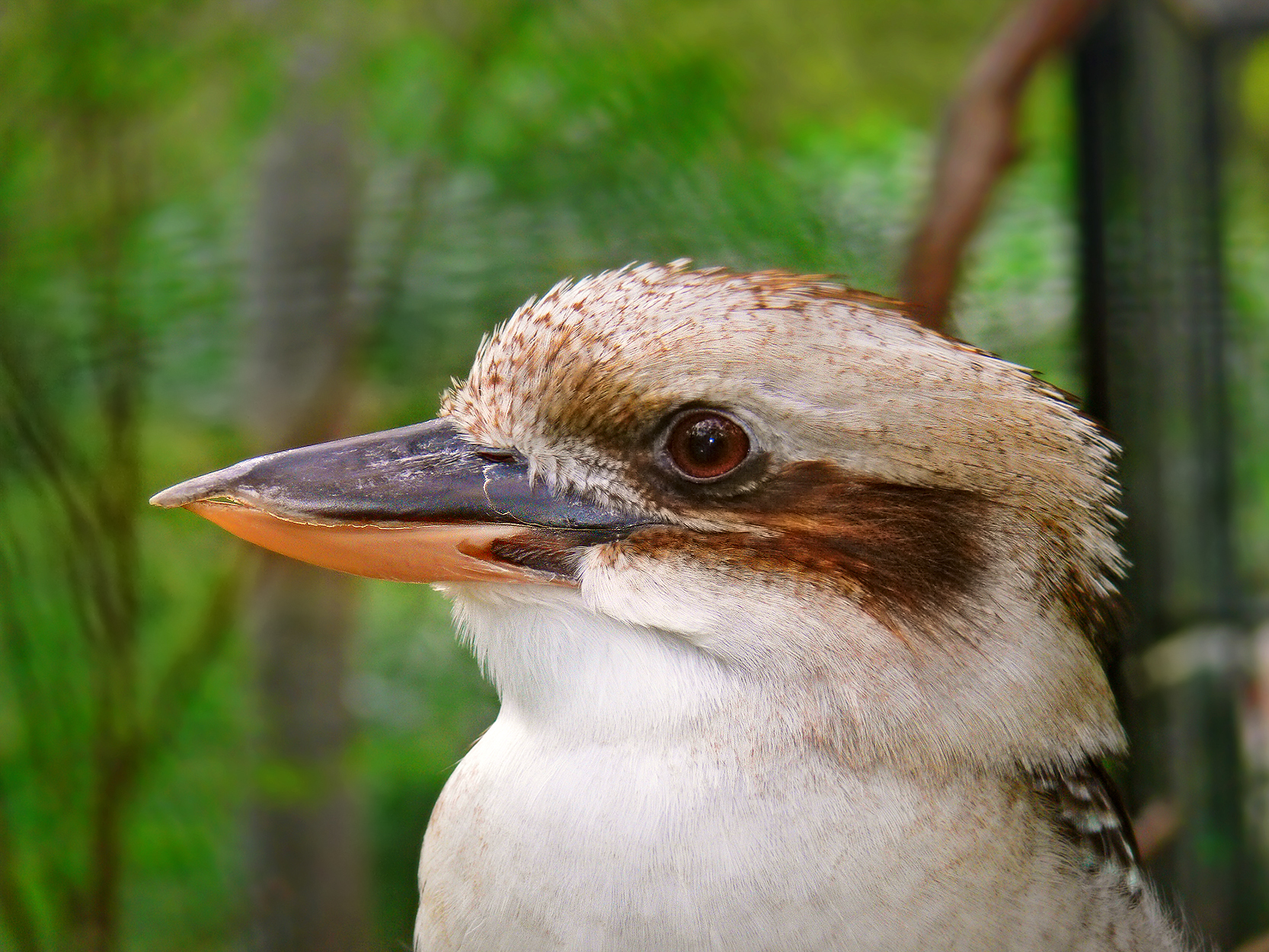 Laughing kookaburra (Dacelo novaeguineae) head and beak detail